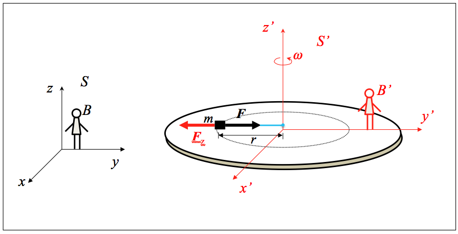 Biraka ari den erreferentzia-sistema ezi-nertzial batean kontuan hartu beharreko indar zentrigugoa.